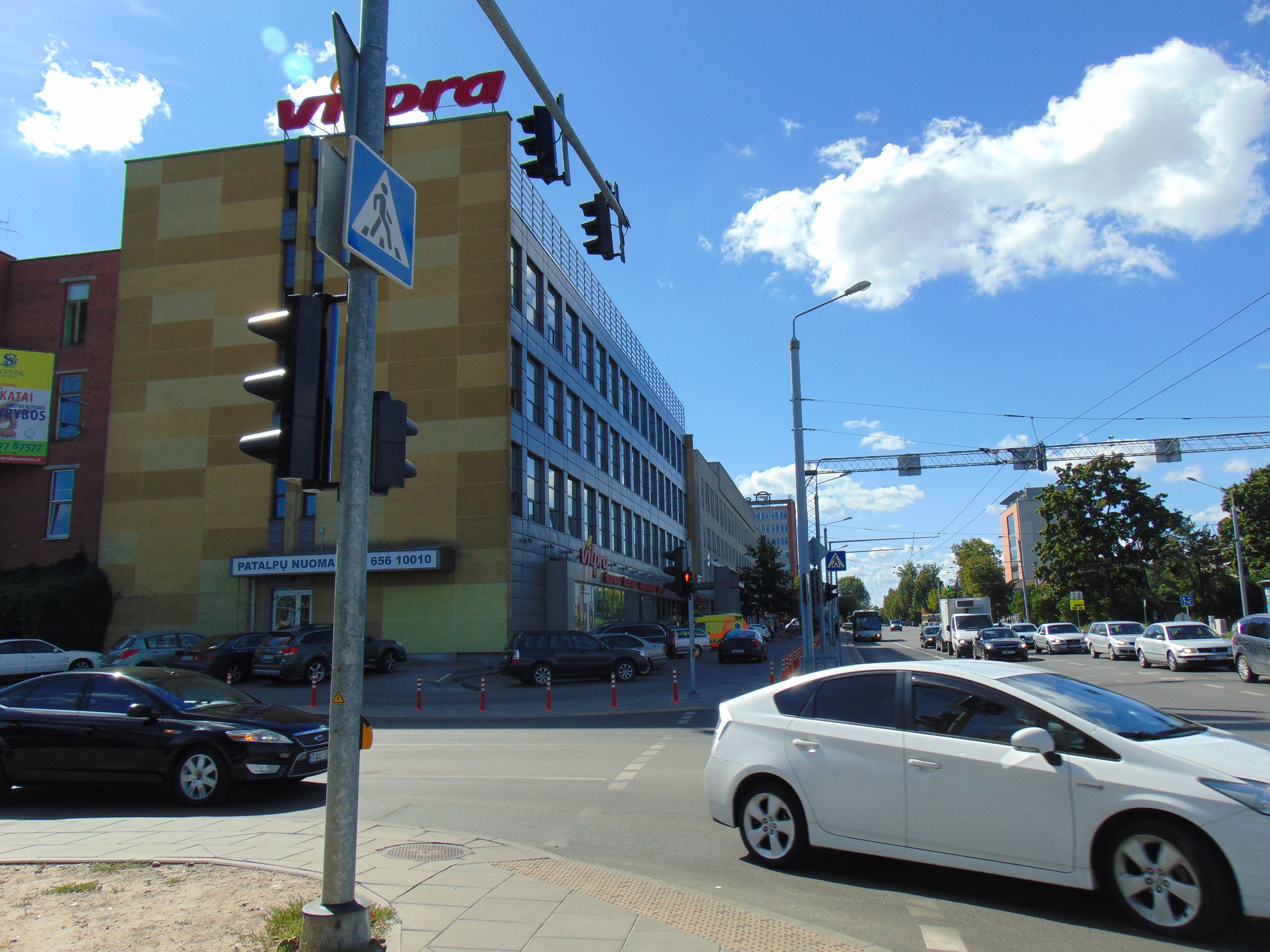 SIGMA